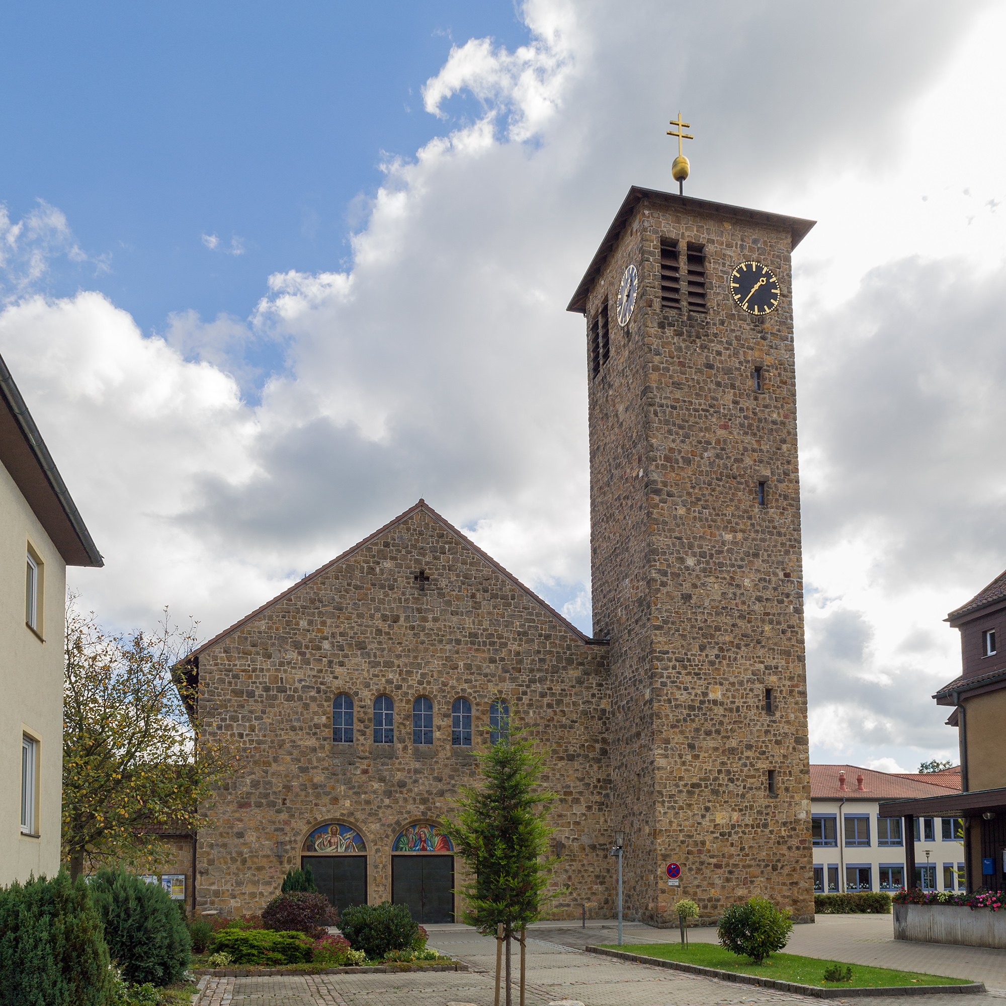 Katholische Pfarrkirche Herz Jesu im oberfränkischen Markt Pressig.